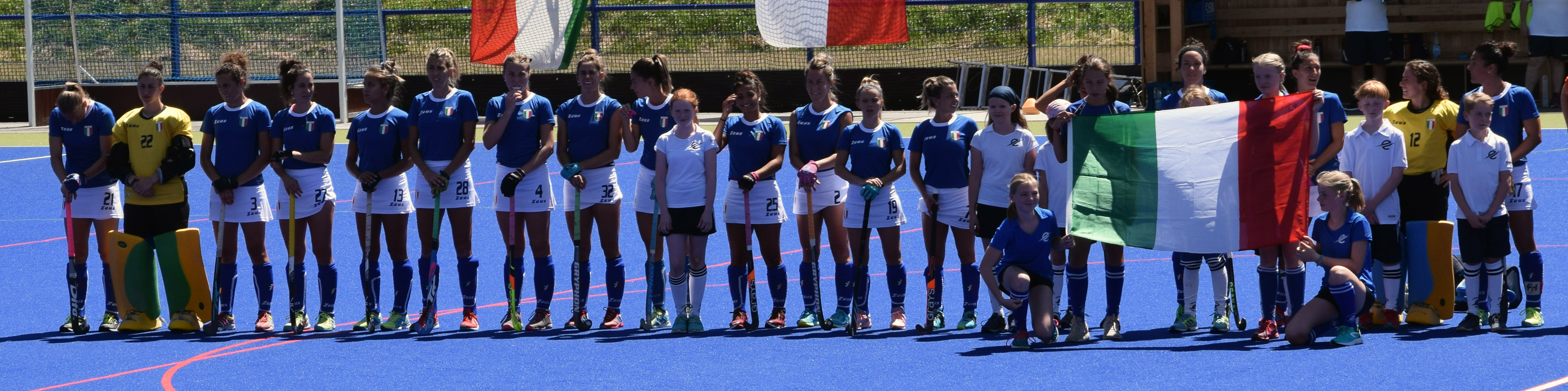 Italienische Hockeynationalmannschaft der Frauen beim Länderspiel gegen Deutschland am 30.06.2018 in Dortmund